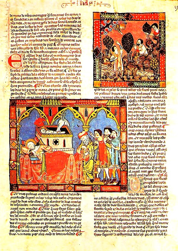 Biblia Alfonsina (1280) - strona opowiadająca o narodzeniu Jezusa